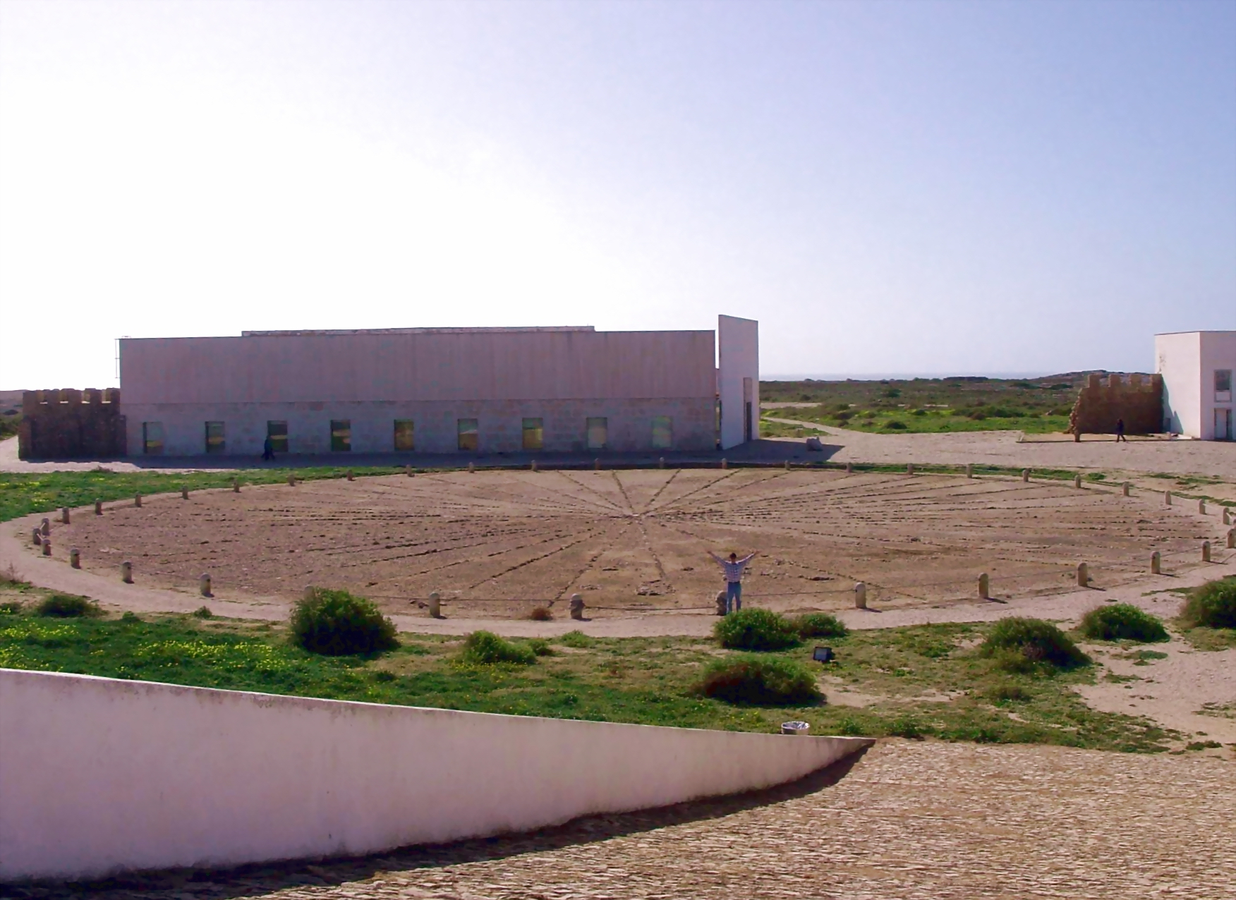 Foto da Rosa dos Ventos da Fortaleza de Sagres - Algarve (2007)